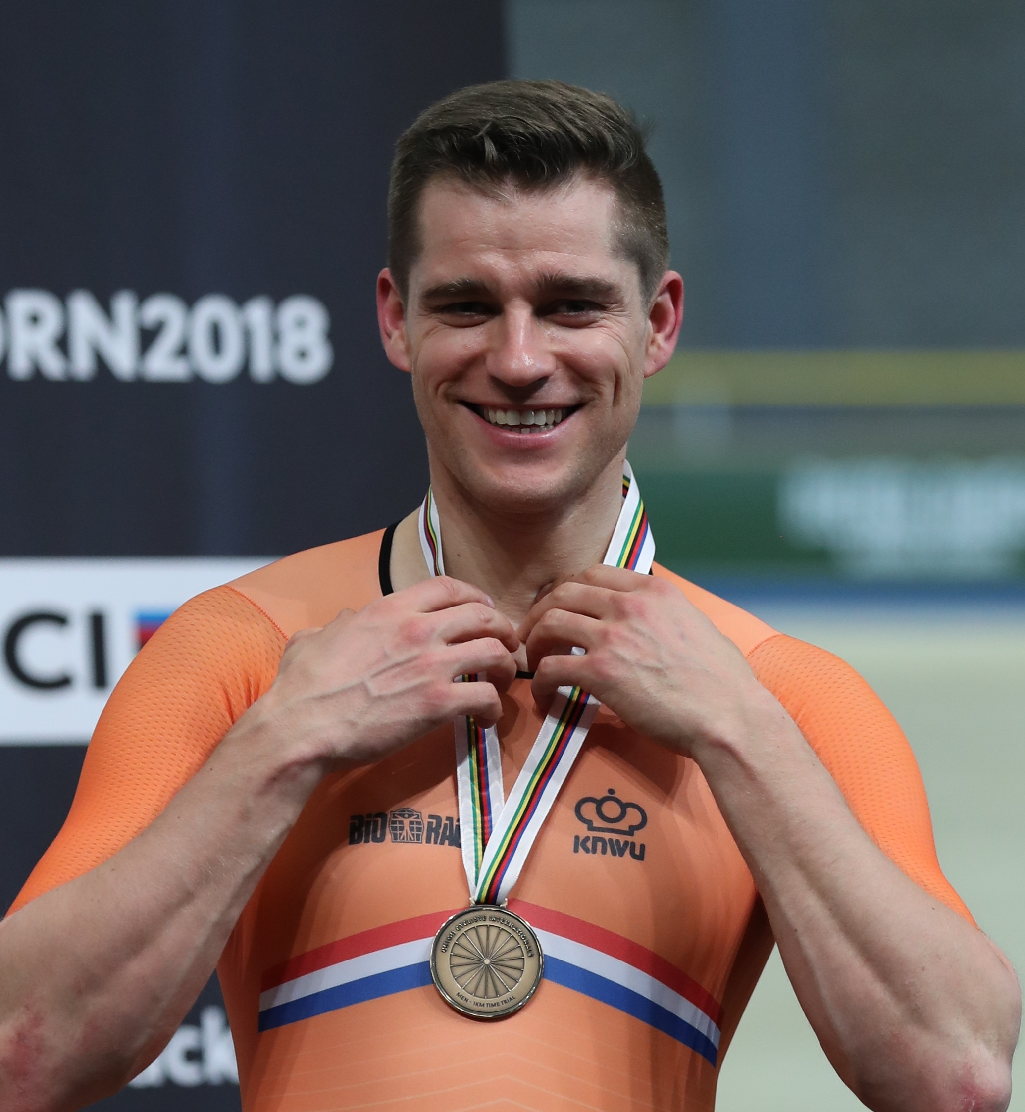 Theo Bos, niederländischer Radsportler - Bronze über 1000m